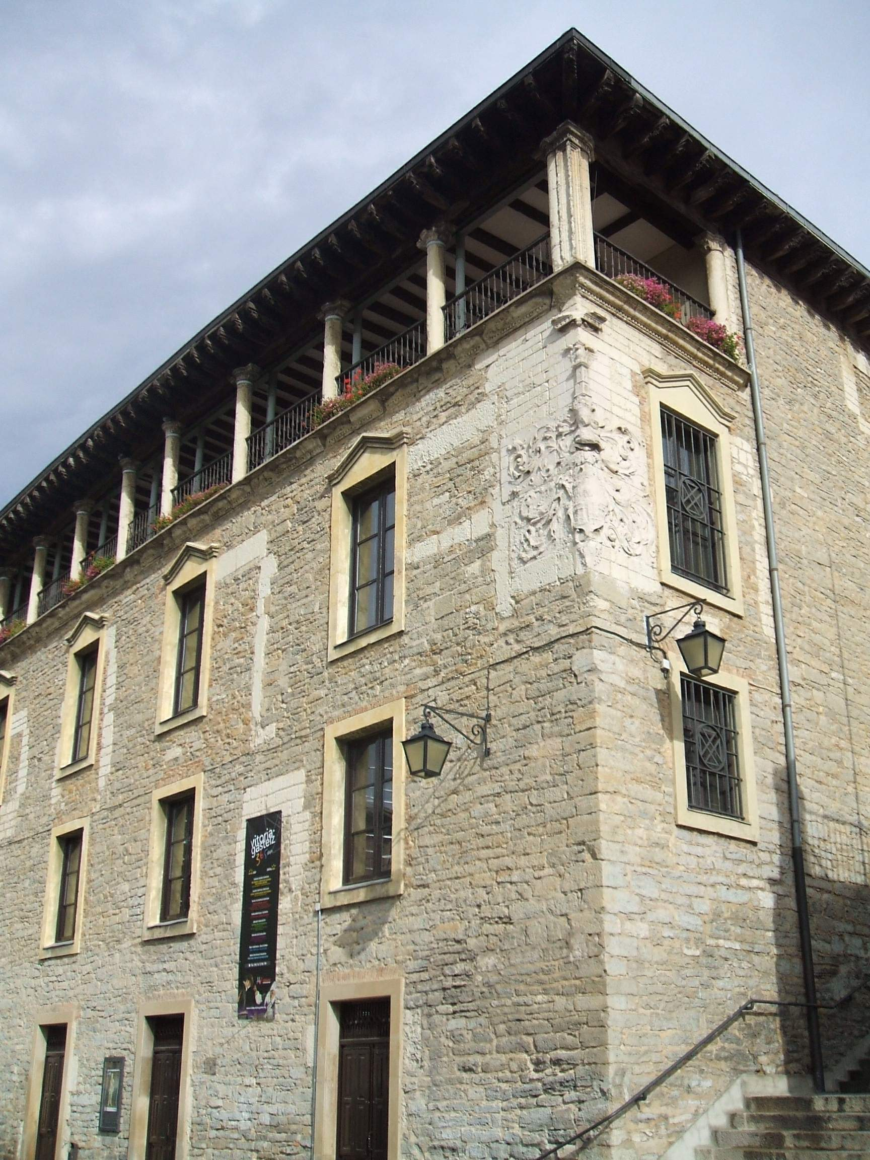 Palacio de Villa Suso (Vitoria)